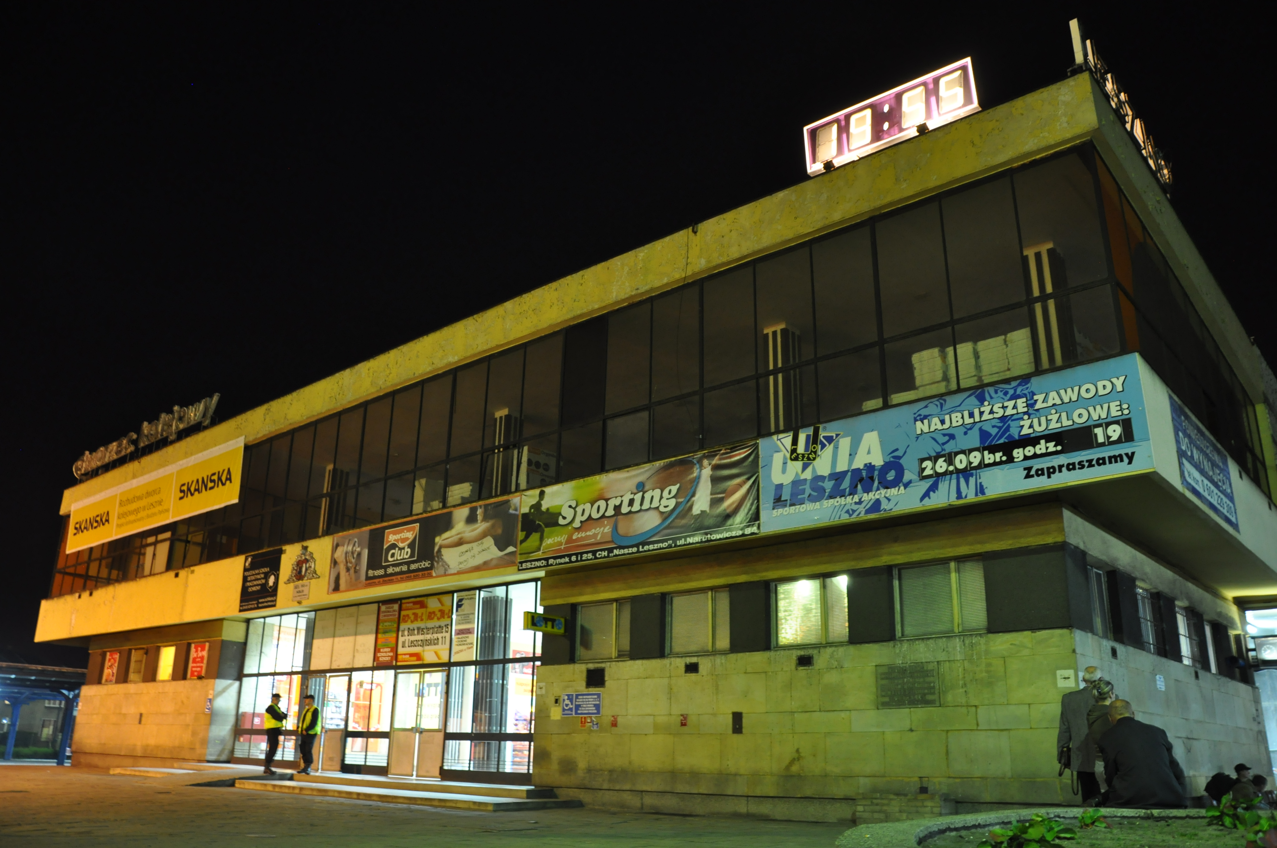 Budynek przed modernizacją